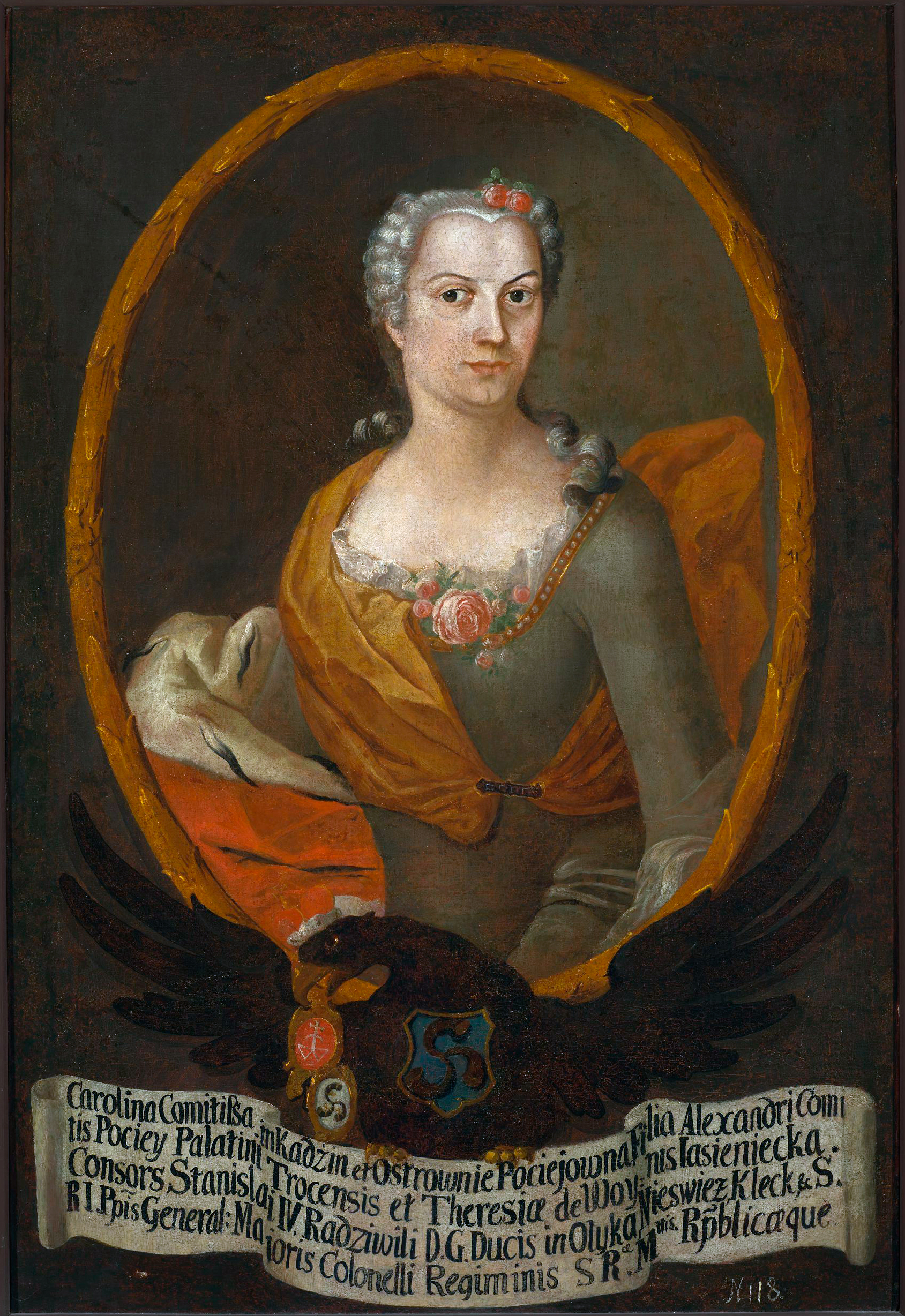 Беларуская (тарашкевіца): Партрэт Караліны Радзівіл (Karalina Radzivił) з роду Пацеяў (Paciej)